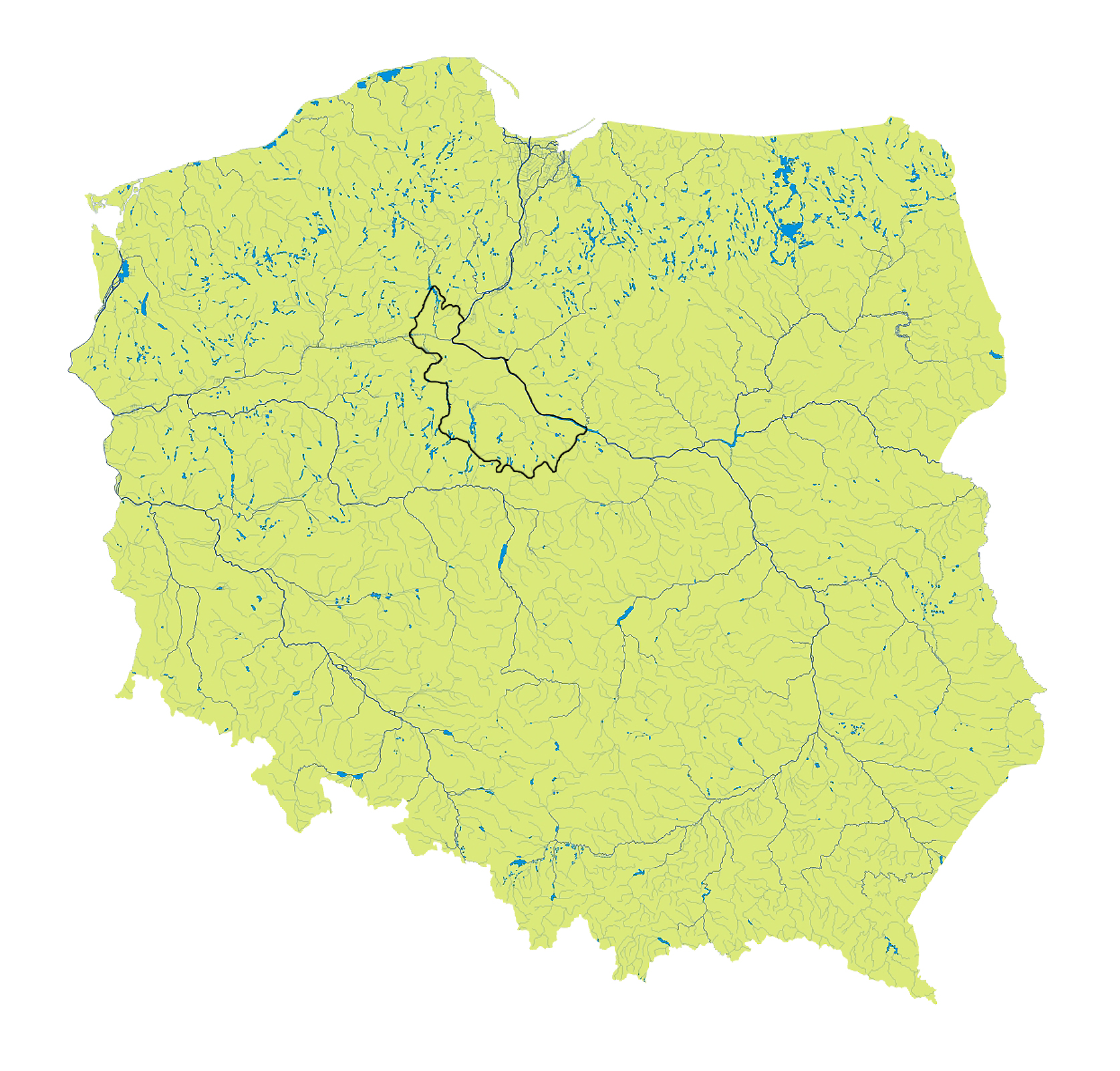 Kujawy na mapie hydrograficznej Polski.